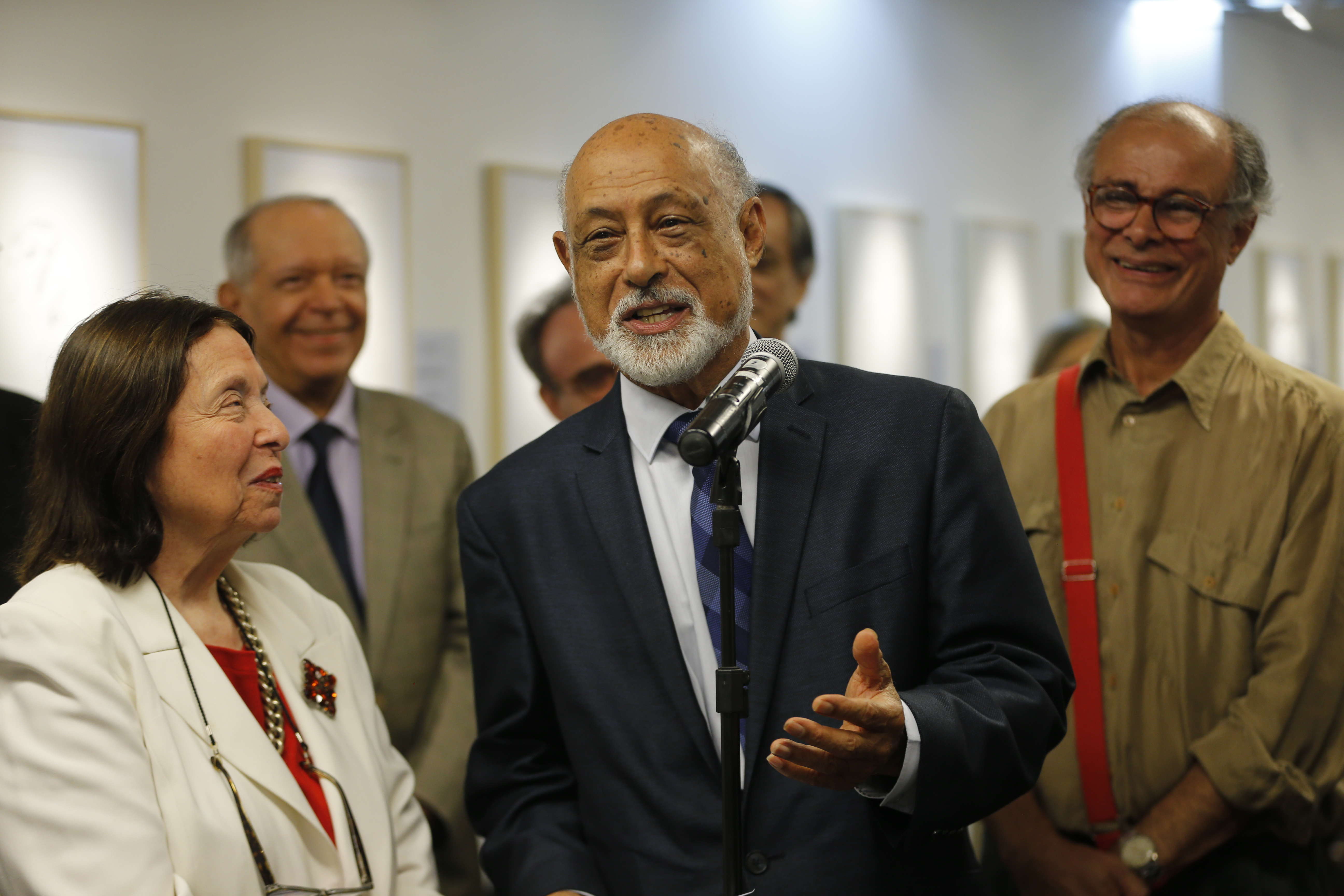 Rio de Janeiro - Domício Proença Filho e Nélida Piñon inauguram a exposição de caricaturas Patronos e Fundadores – 120 anos da Academia Brasileira de Letras (Fernando Frazão/Agência Brasil).